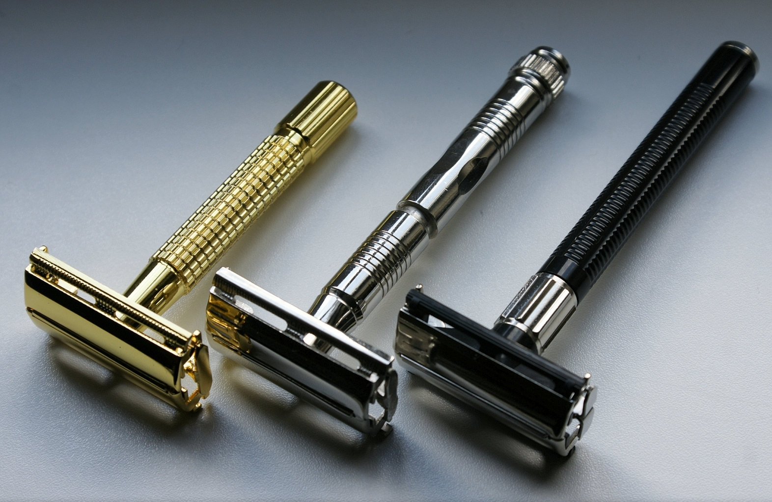 Zeitgenössische Rasierhobel aus Asien (Weishi, Parker, Feather=